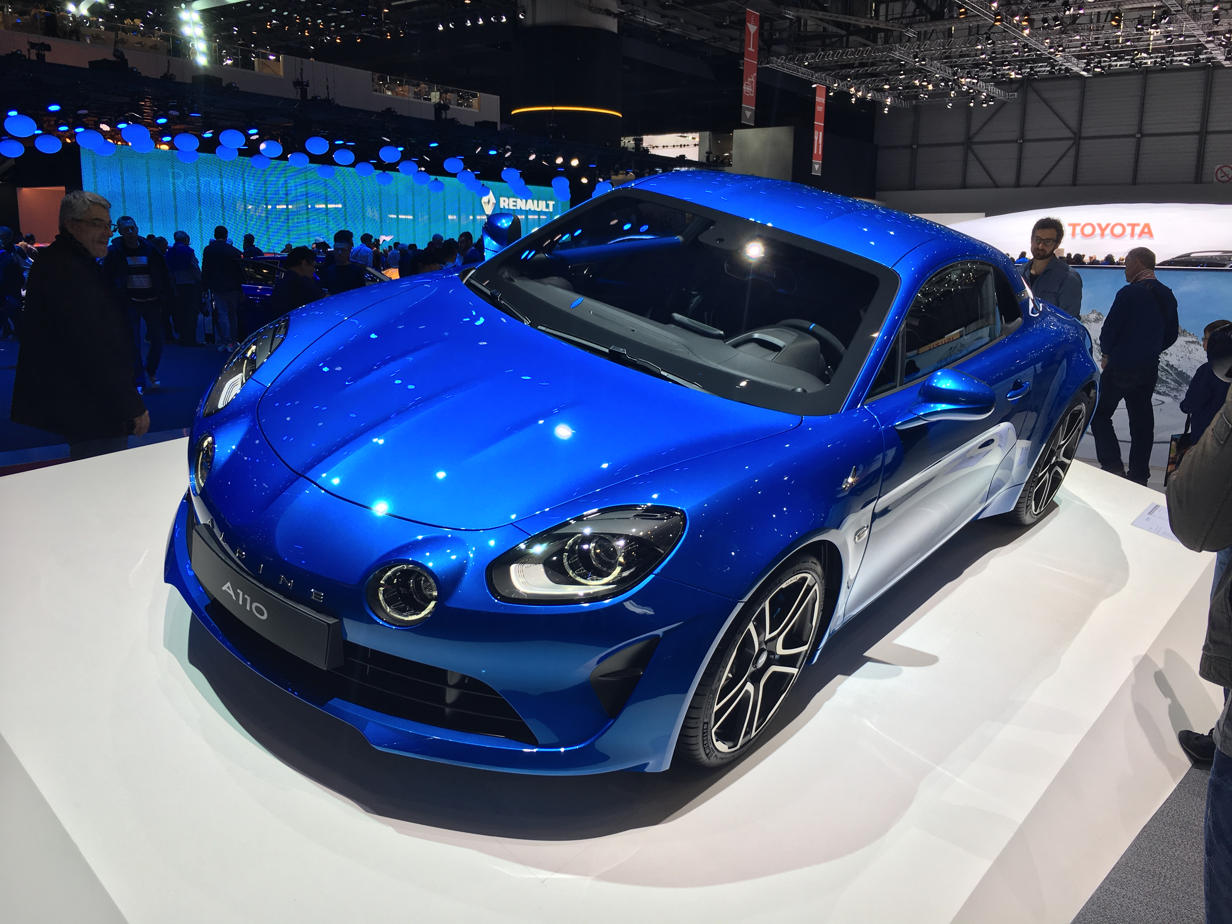 Geneva Auto Salon 2017